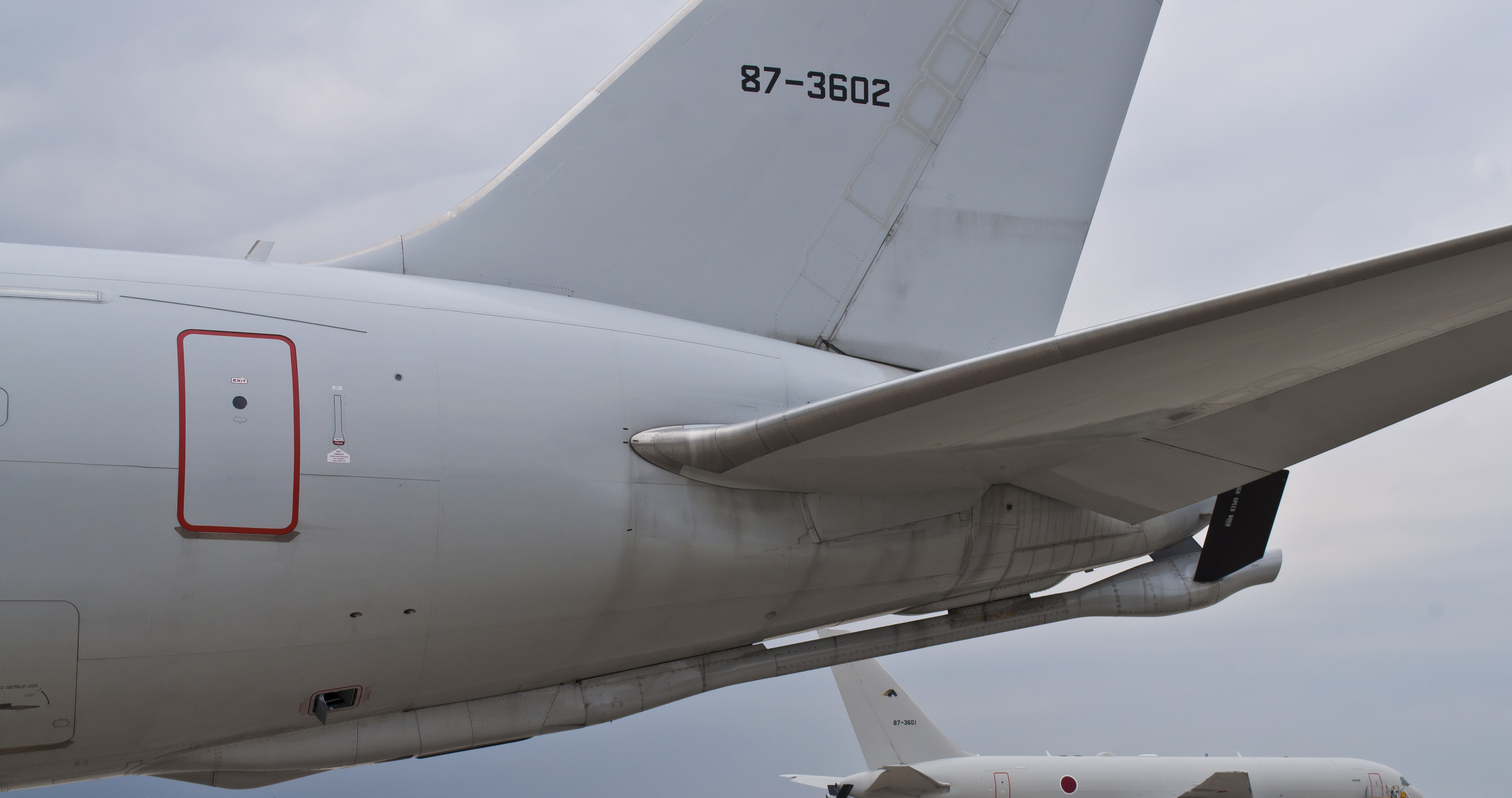 航空自衛隊KC-767Jのフライングブーム。2015年小牧基地オープンベースにて撮影